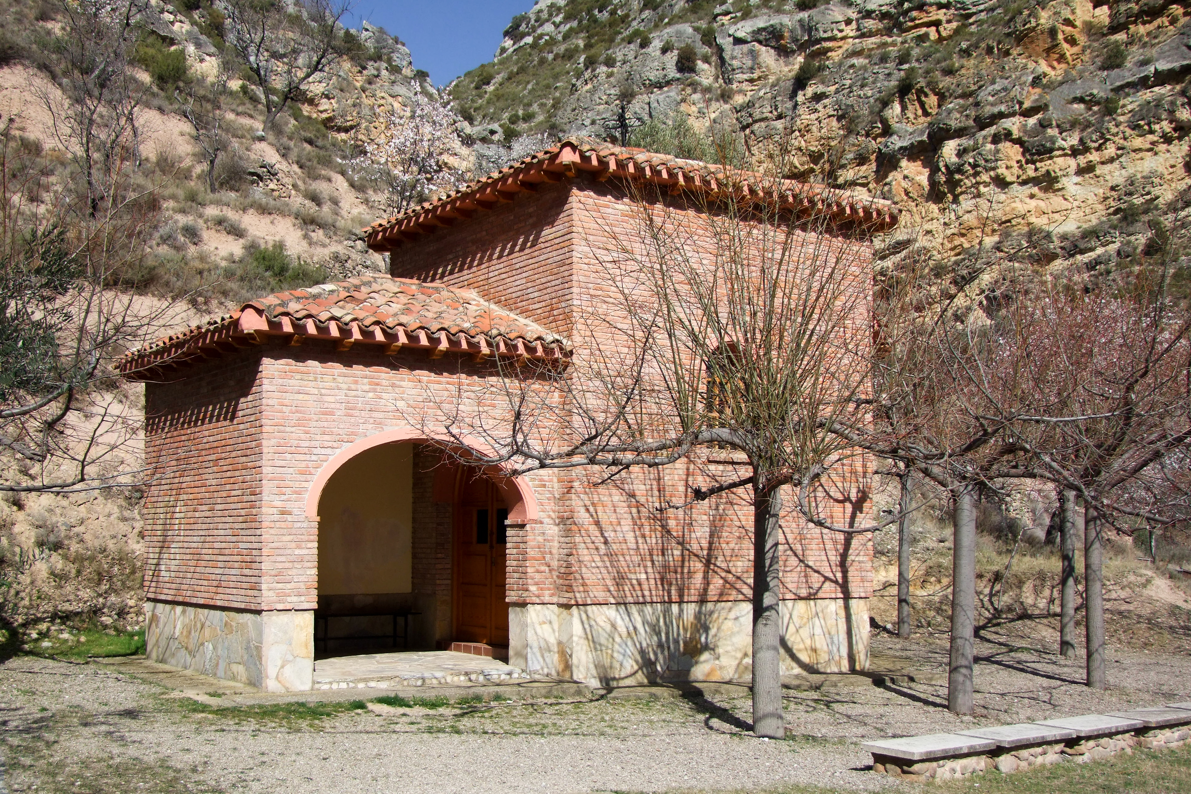 Ermita de Santiago en la localidad de Arnedillo, La Rioja - España